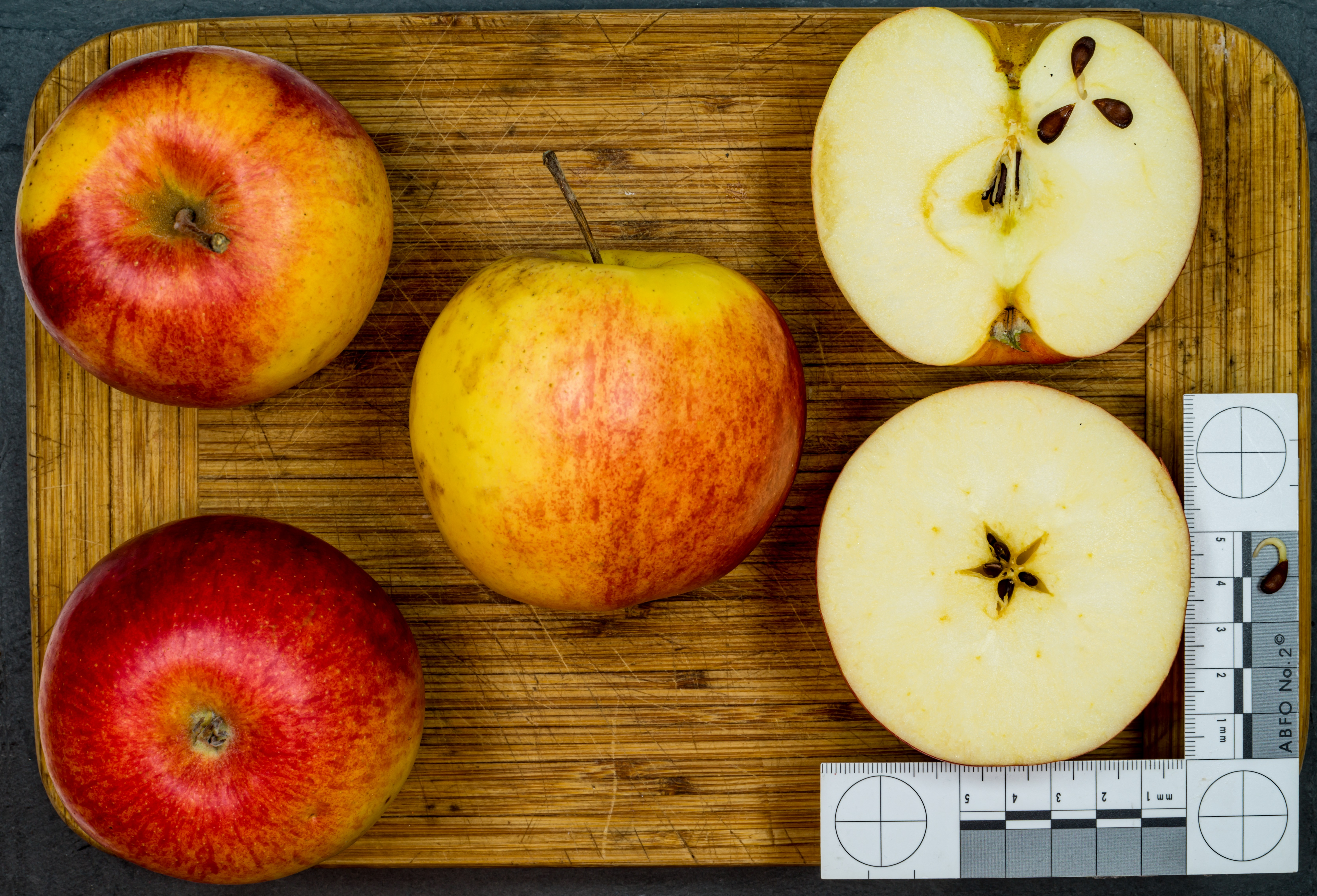 Apfelsorte: Jonagold, Red Prince 1943 Versuchsstation der Cornell University´ Golden Delicious x Jonathan